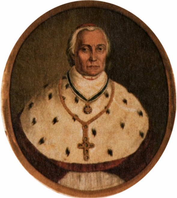 Gregorius Thomas Ziegler, Bischof von Tyniec-Tarnów und ab 1827 von Linz